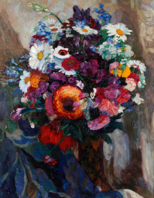 Strauß von Sommerblumen wie Margeriten, Rittersporn, Nelken und Wicken in einer Vase, 1919 in Öl von dem Künstler Hans Müller-Dachau (Falzmaß ca. 78 x 60 cm) ...